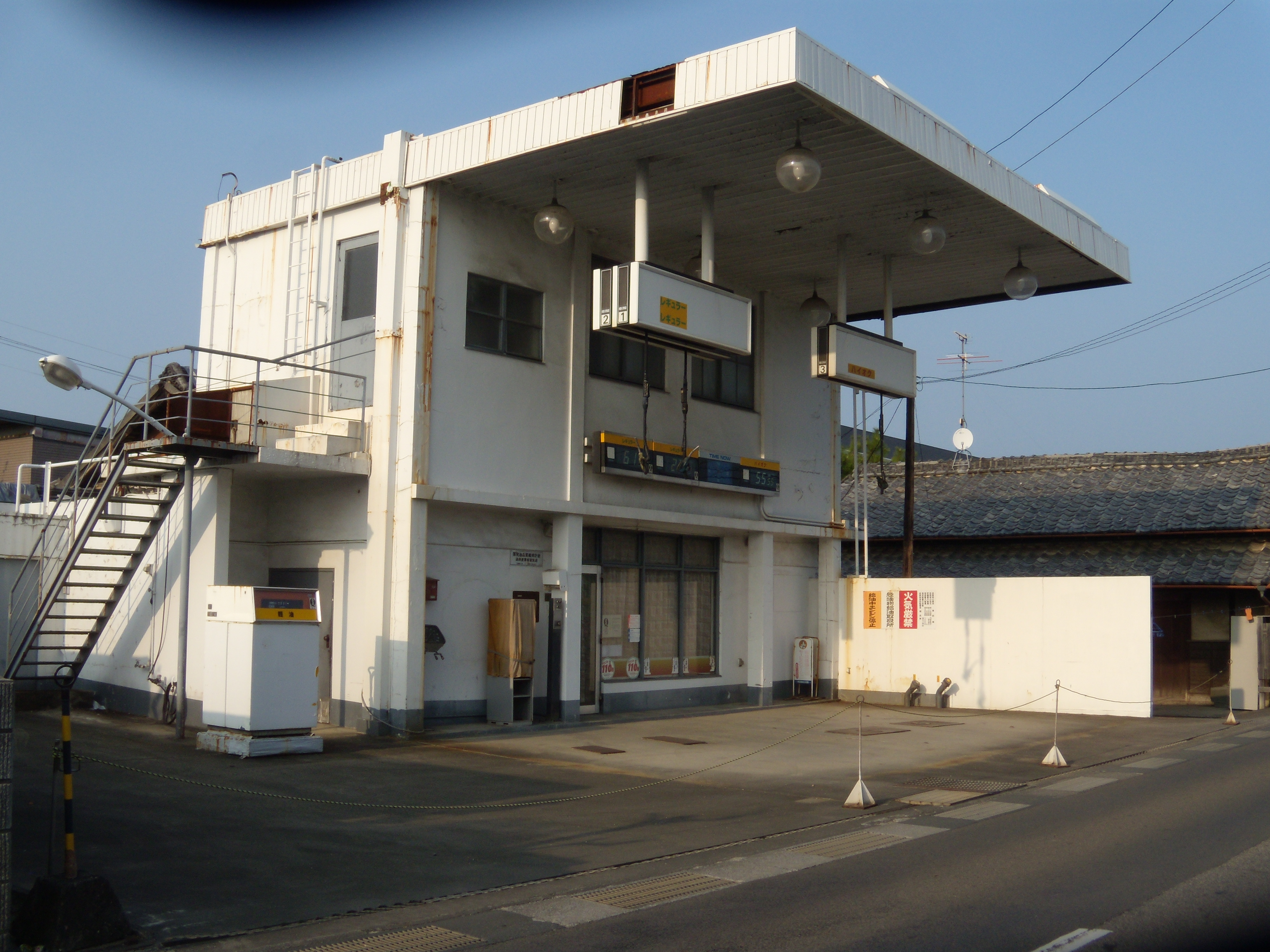 閉店し、廃墟と化したガソリンスタンド。(愛媛県新居浜市)給油機の色や窓の装飾などから、昭和シェルの店舗だったと思われる。